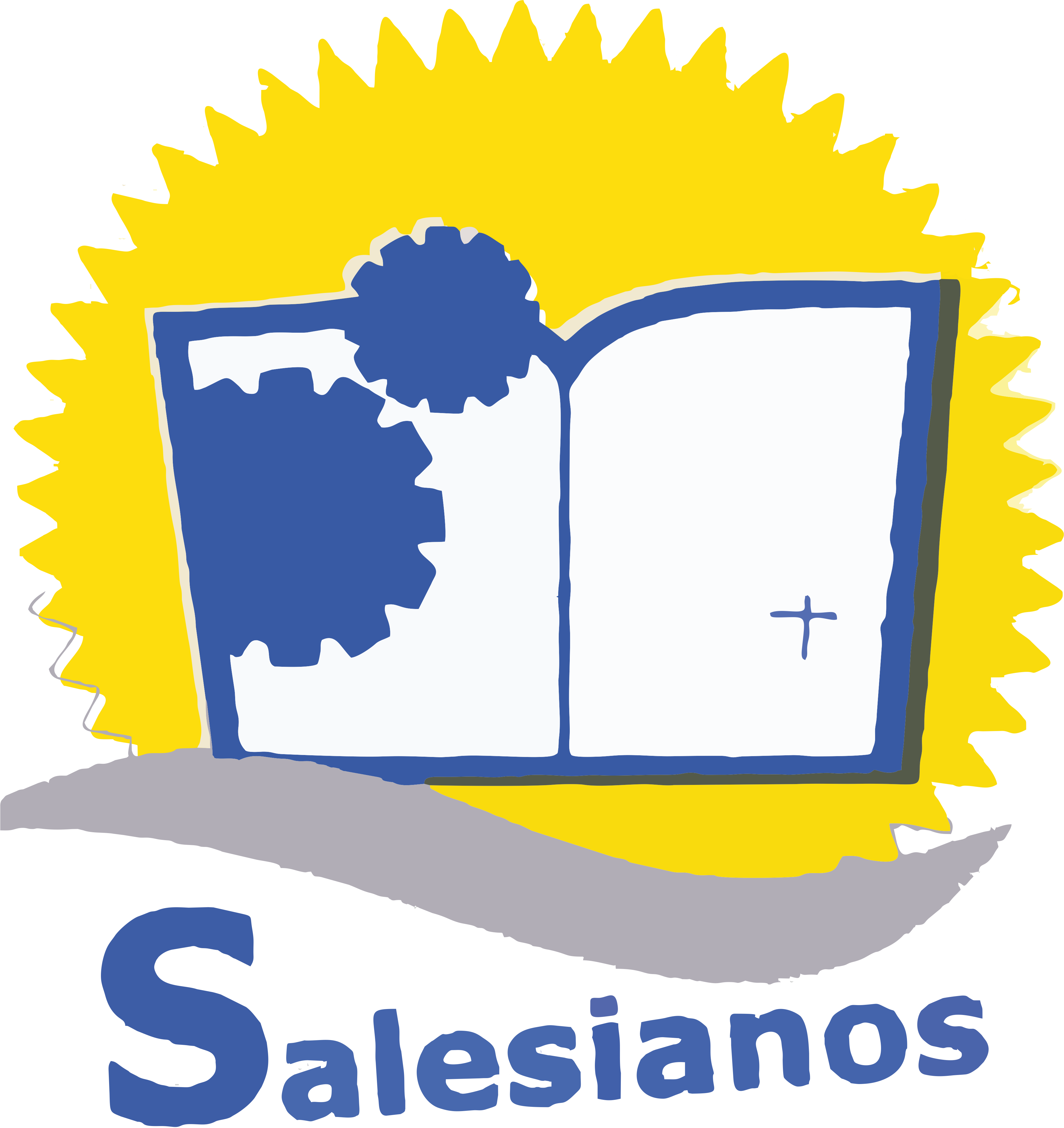 Logótipo da Escola Salesiana de Artes e Ofícios de Mindelo (ESAO)